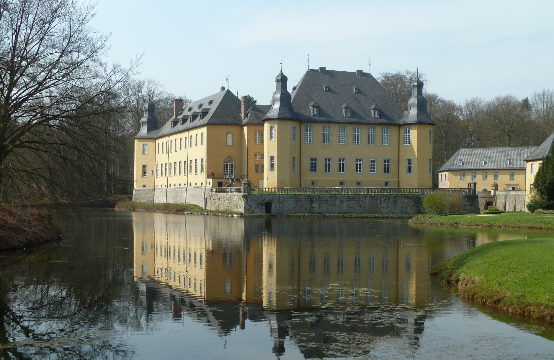 Schloss Dyck in Jüchen, Ansicht über den Schlossteich von der Barockbrücke aus